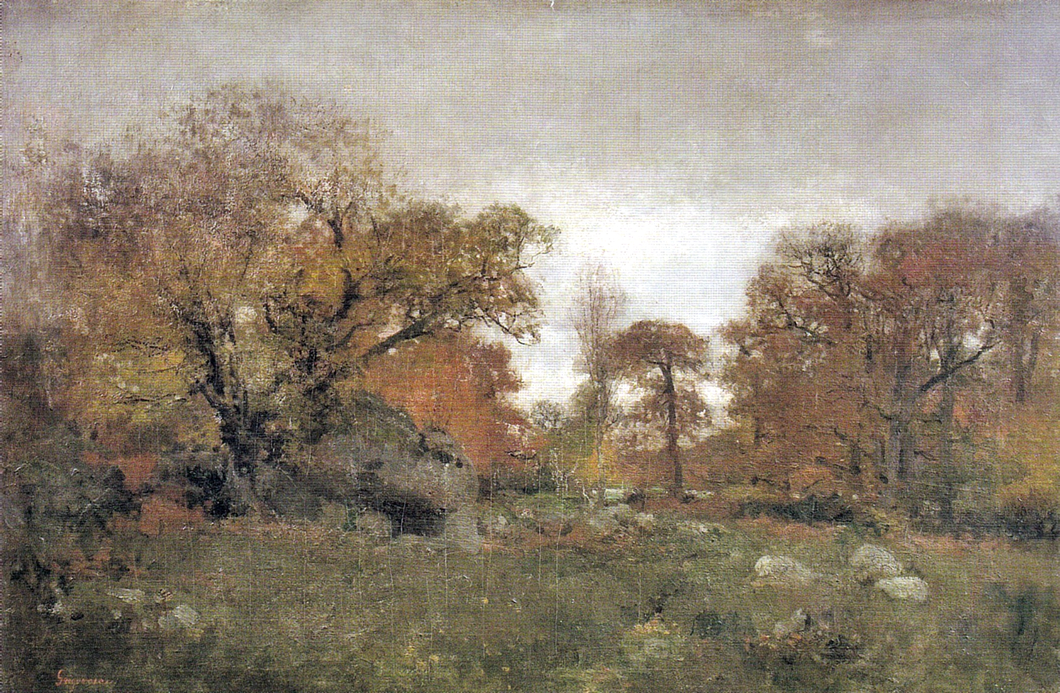 Toamna la Fontainebleau, ulei pe pânză, 92,4 x 138,2 cm - Galeria de Artă Românească Modernă de la Muzeul Național de Artă al României.